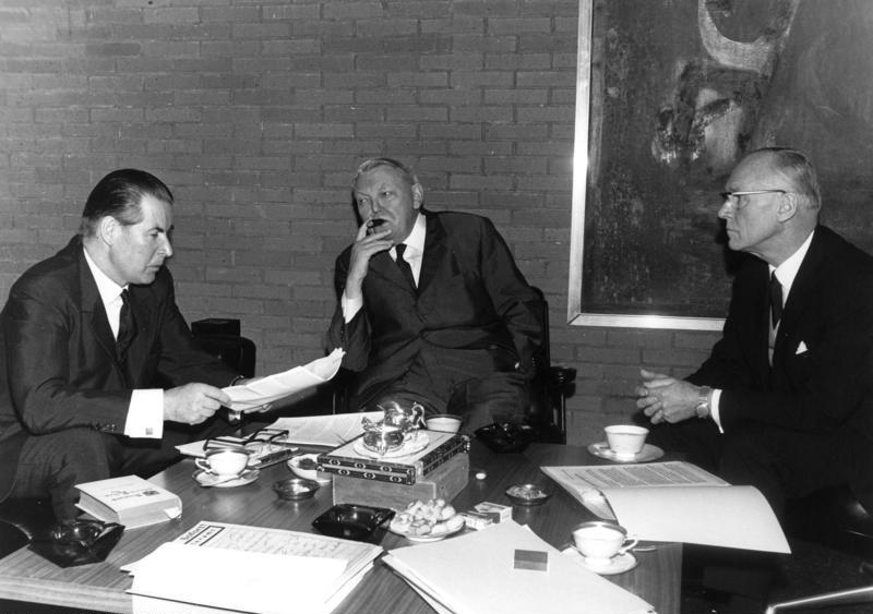 Bundeskanzler Prof. Ludwig Erhard (Mitte) erörtert am 27.11.1965 im Kanzlerbungalow mit dem Bundesminister des Auswärtigen, Dr. Gerhard Schröder (li.), und dem Chef des Bundeskanzleramtes, Bundesminister Dr. Ludger Westrick (re.), die politische Lage.